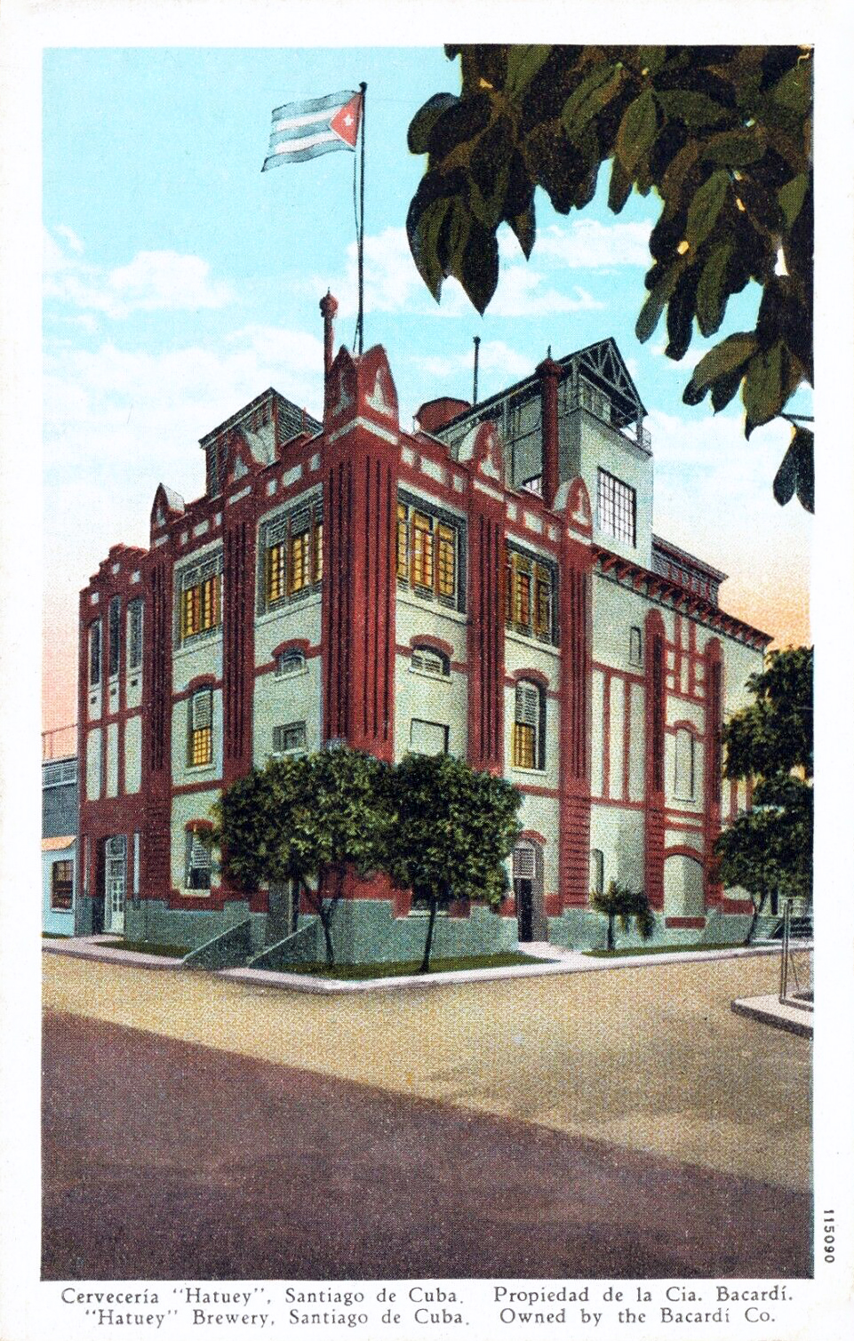 Abbildung der Brauerei "Hatuay" in Santiago de Cuba (ca. 1920)